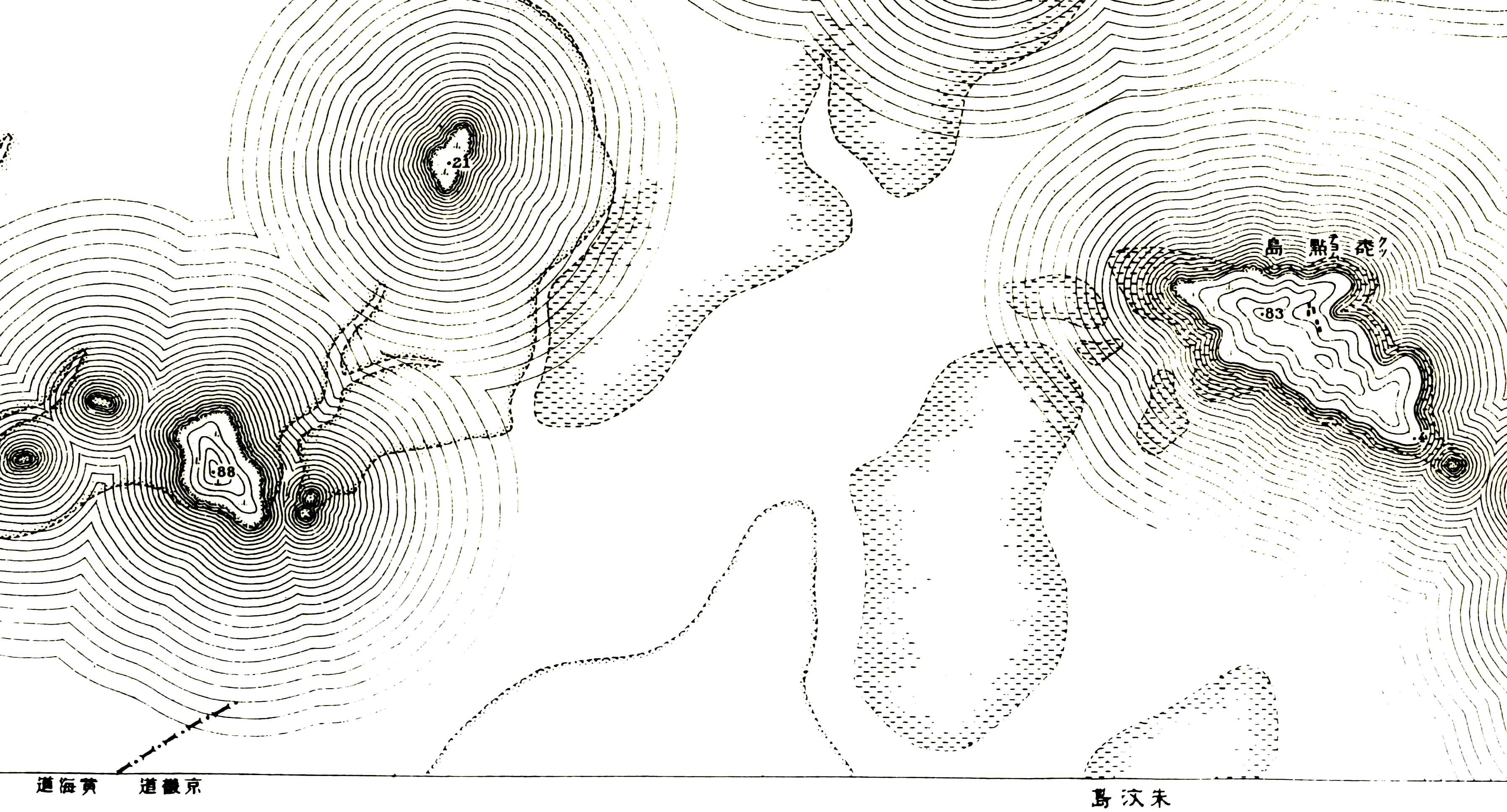 구한말한반도지형도 한성14호 중 일부분.